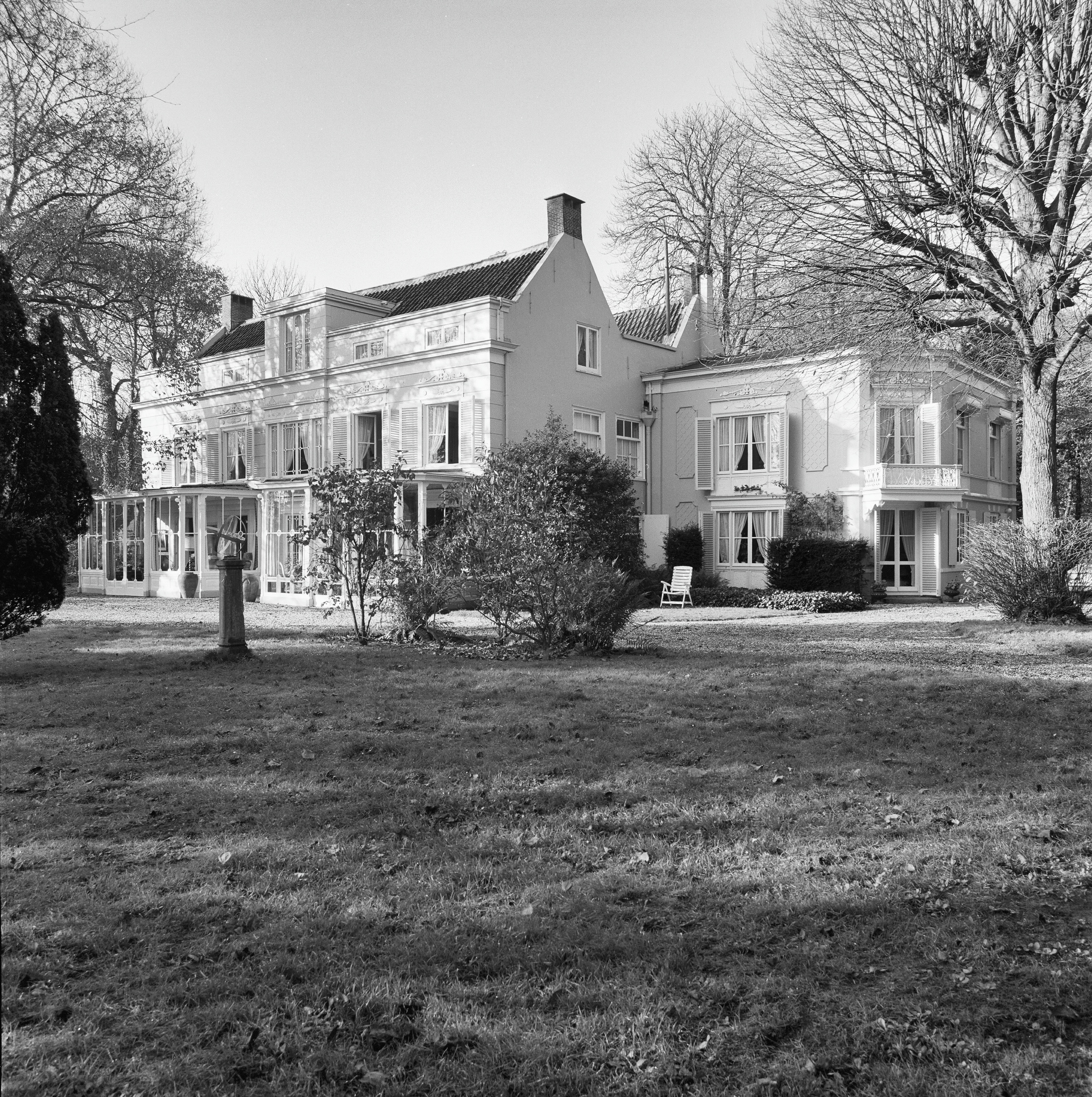 Huize Calorama", zij- en achtergevel